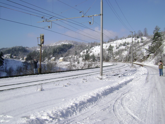 Kolodvor Brod Moravice